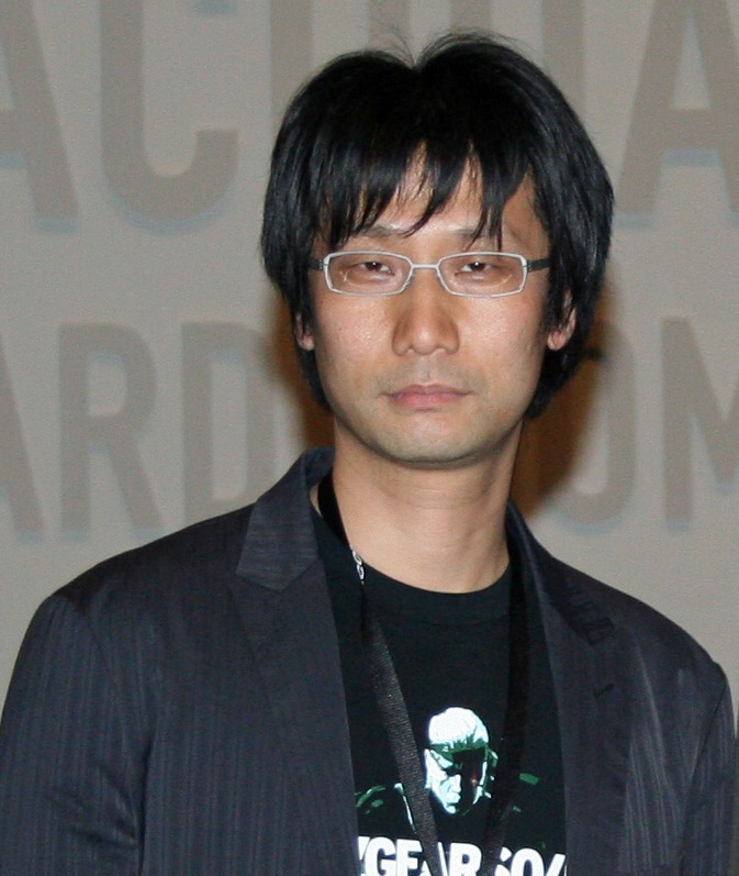 Hideo Kojima at GO3 in Perth